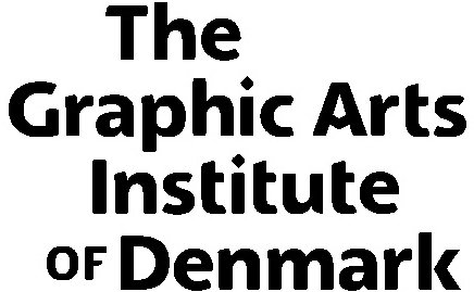 Englich logo